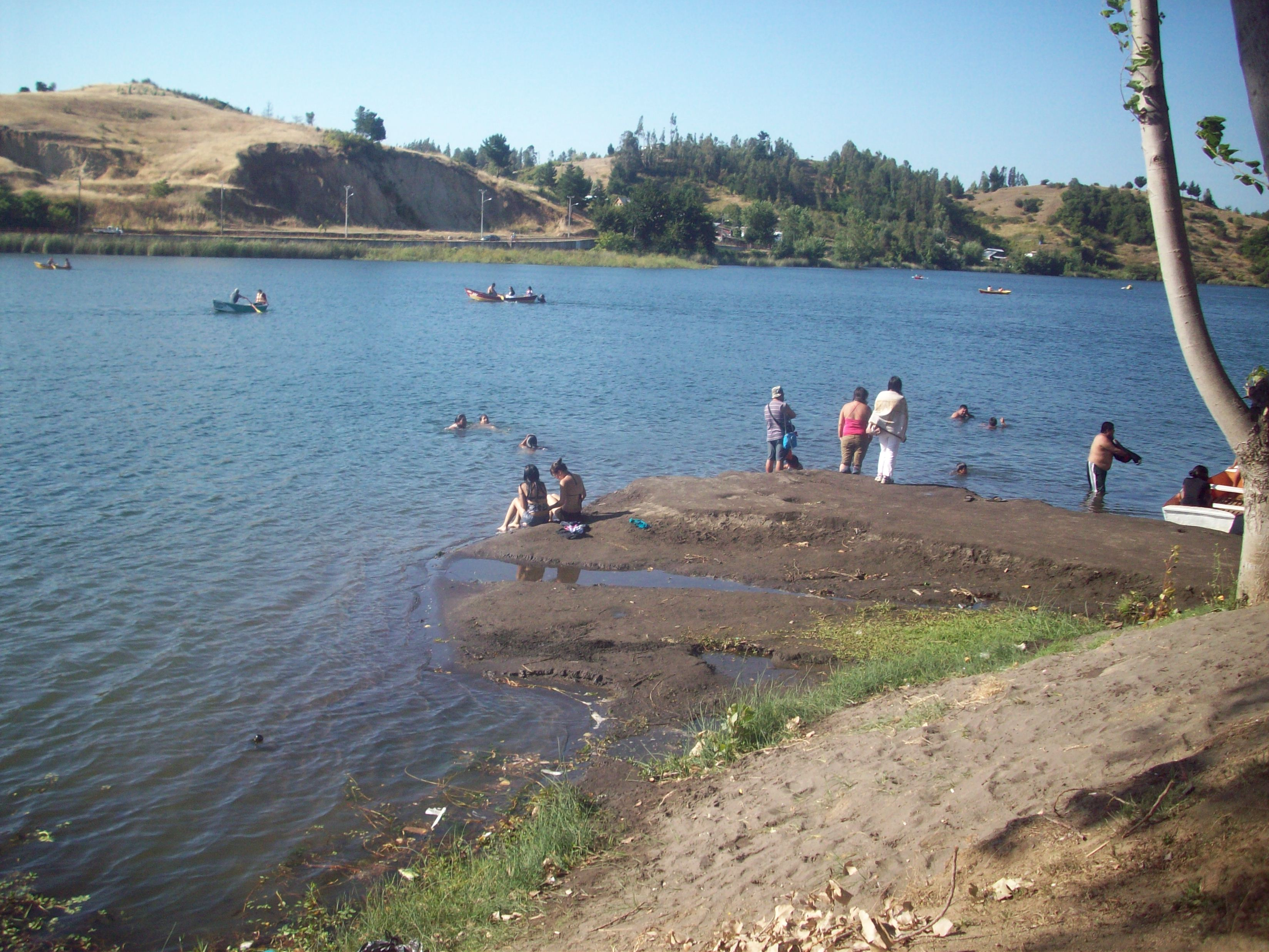 vacaciones en la laguna